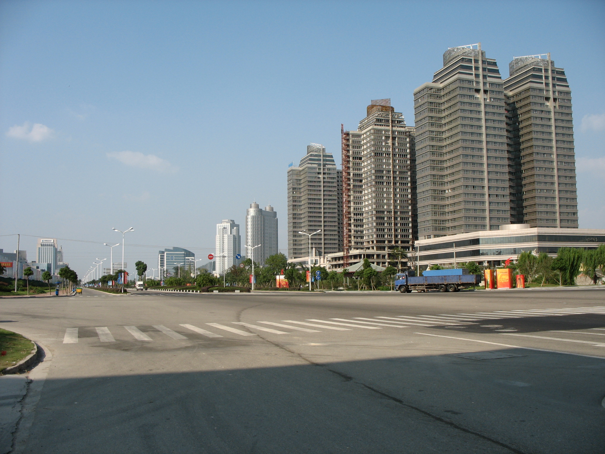 台州城市风光